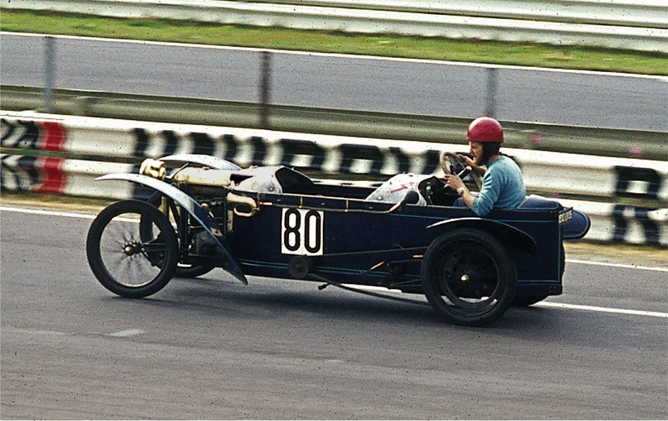 Bédélia, Cyclecar, Baujahr um 1910